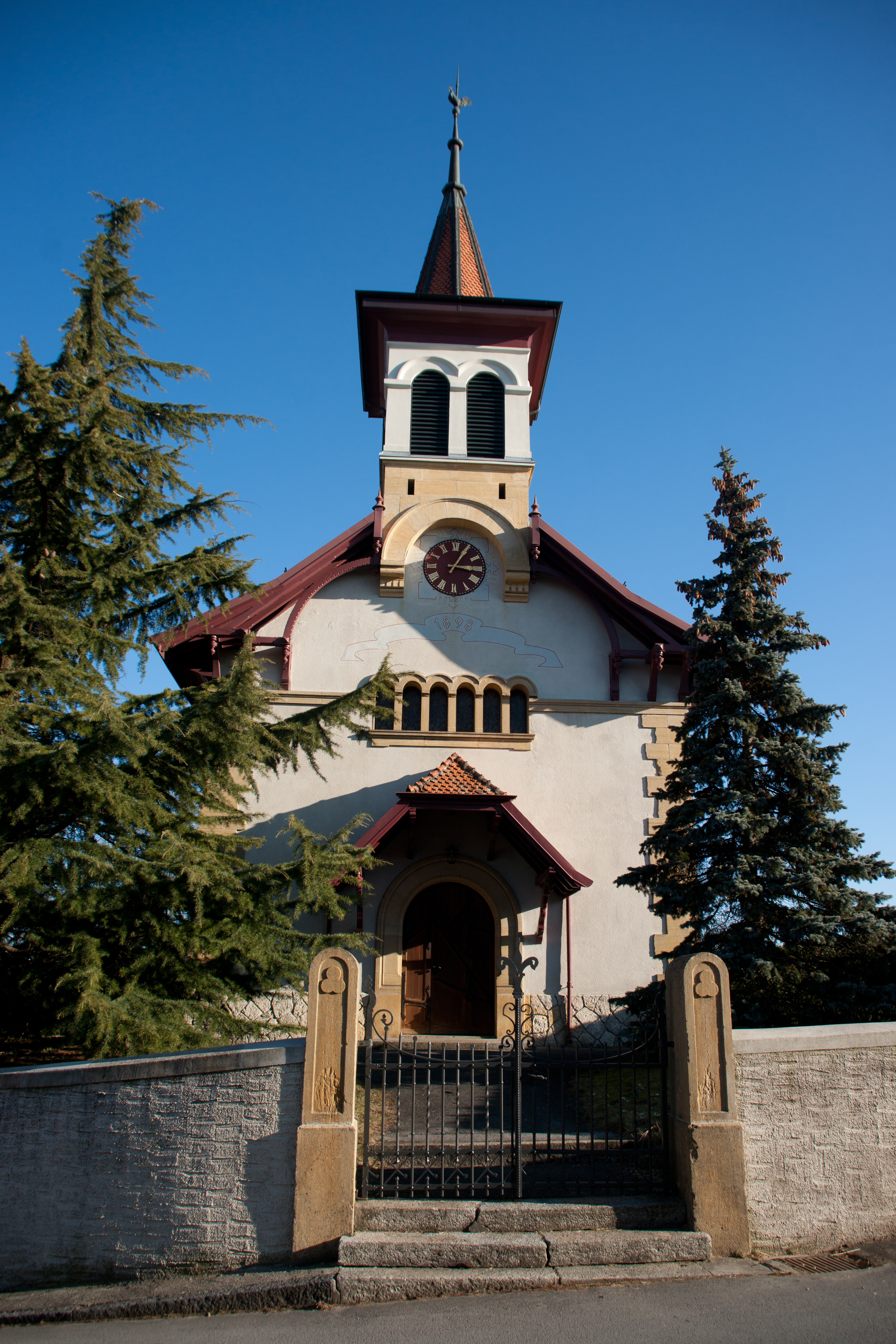 Église de Chevilly, canton de Vaud, Suisse.